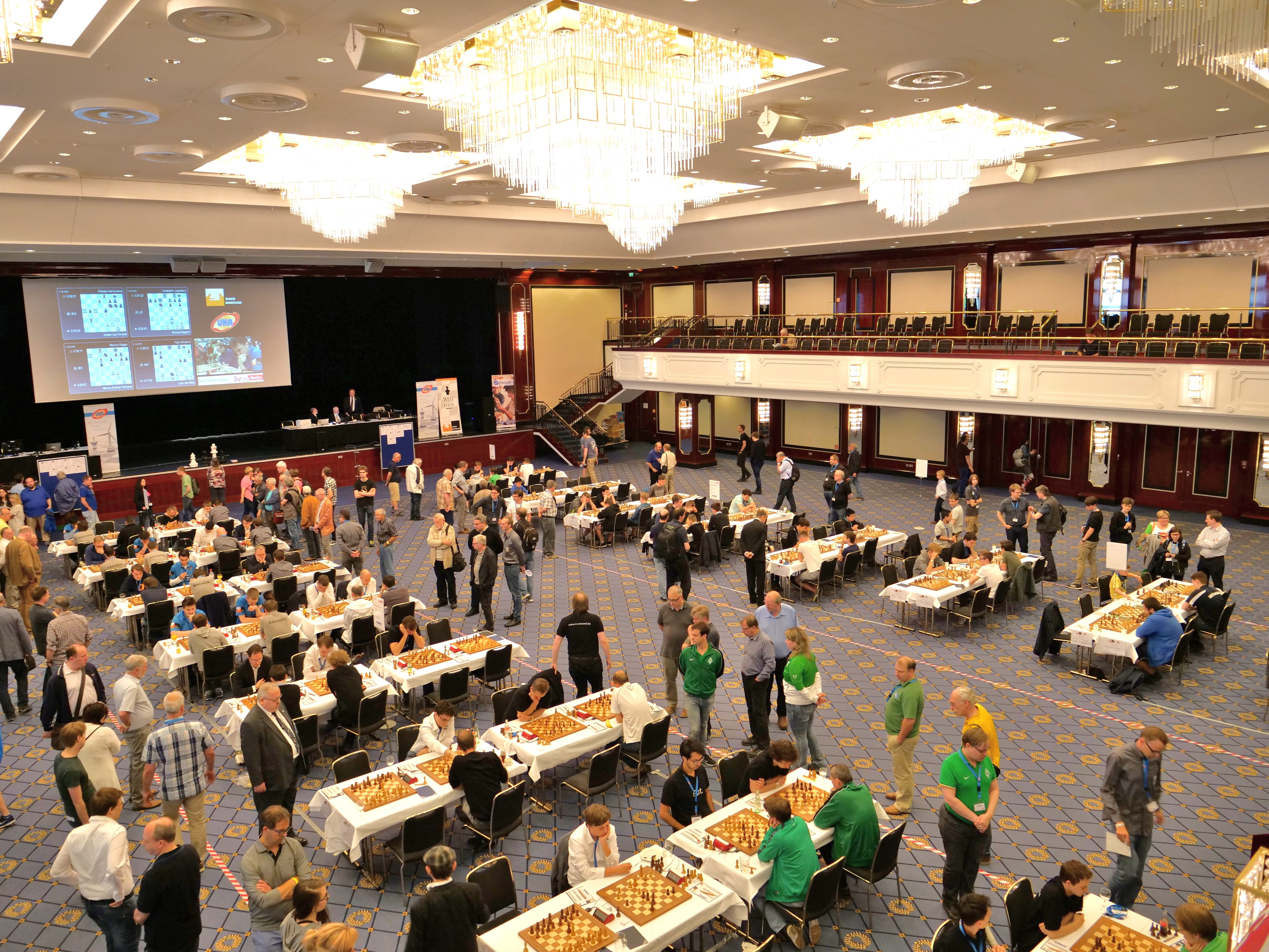 Finalrundensaal im Maritim Hotel Berlin - H - Schachbundesliga 30-4-2018